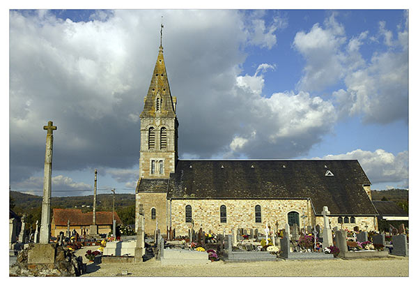 Eglise de Bion.